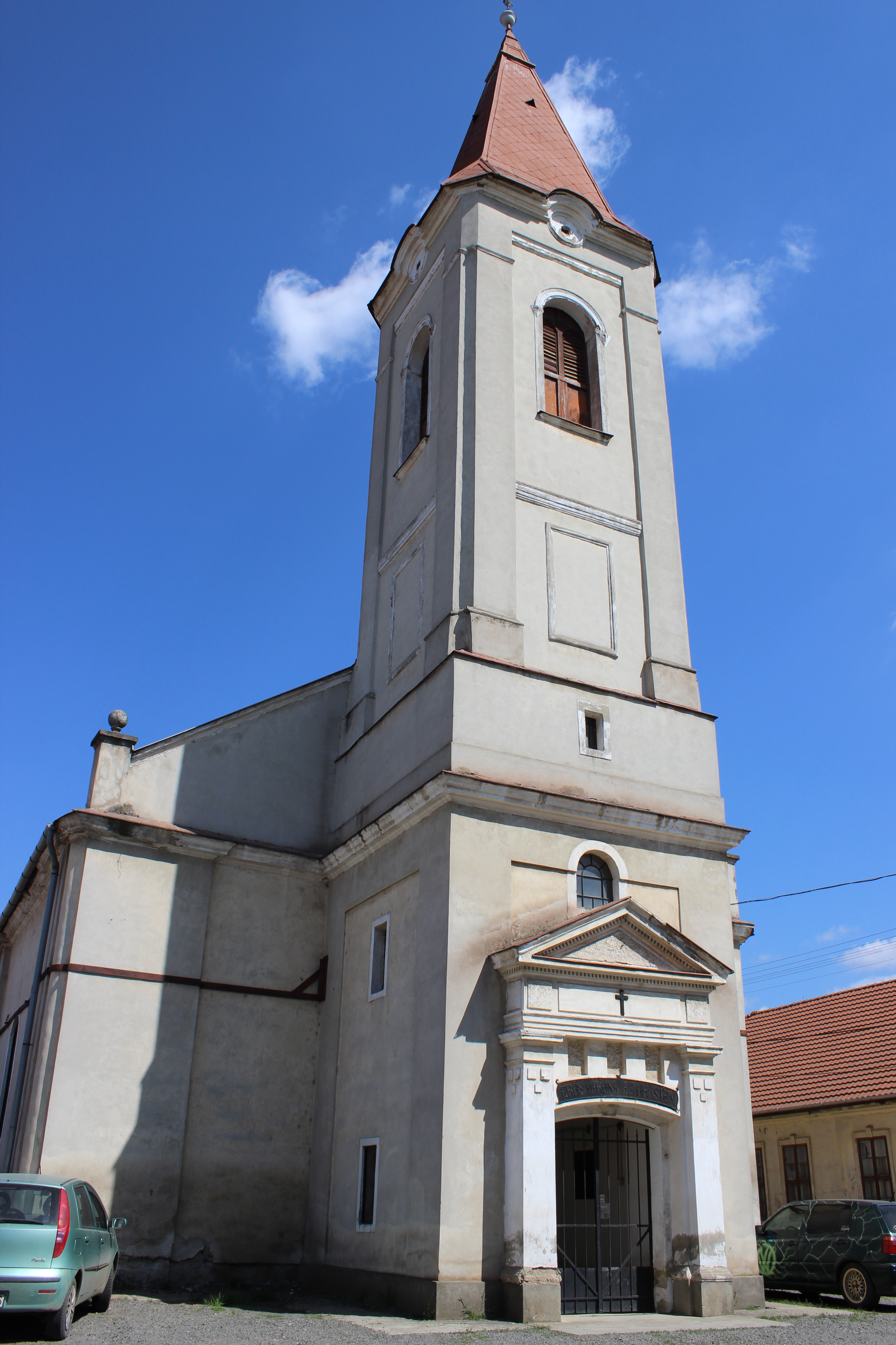 3881 Abaújszántó, Jászay tér